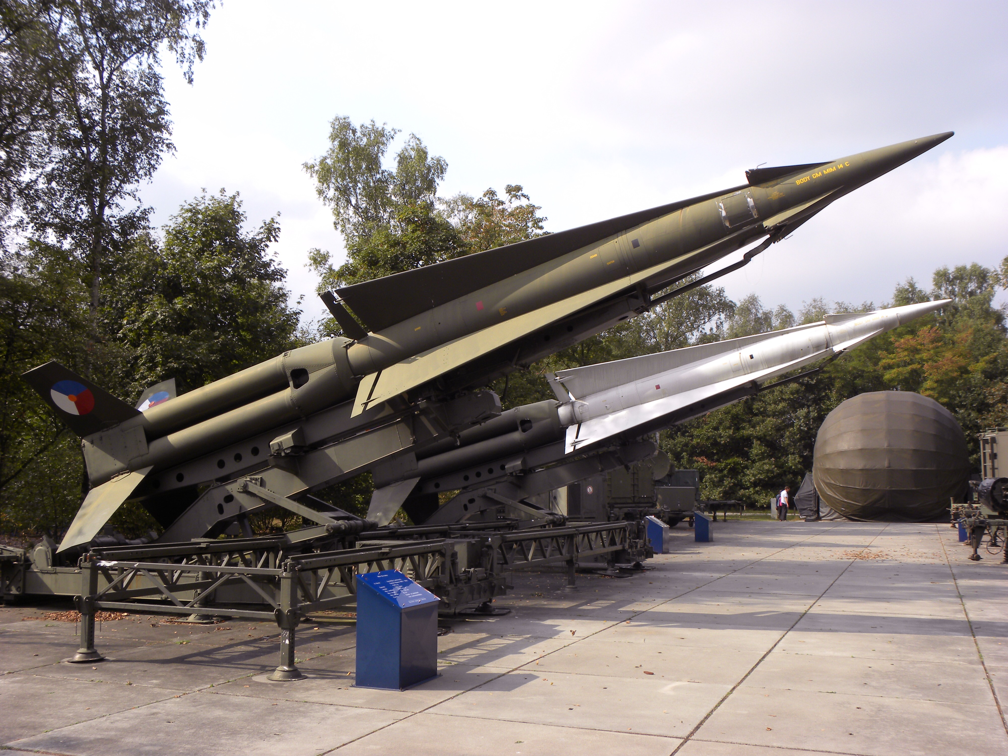 seen at militare luchtvaart museum Soesterberg